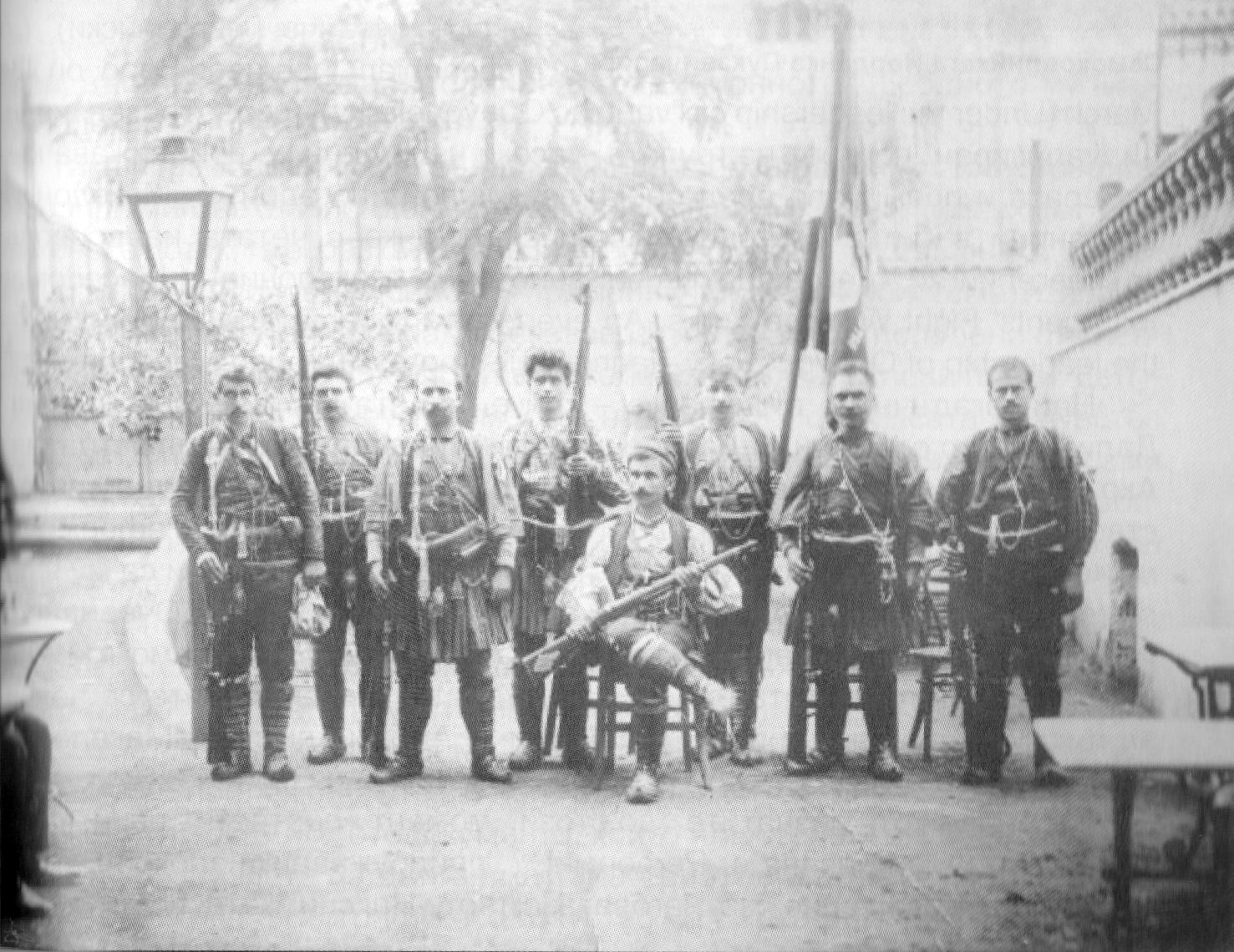 Четата на Апостол войвода.